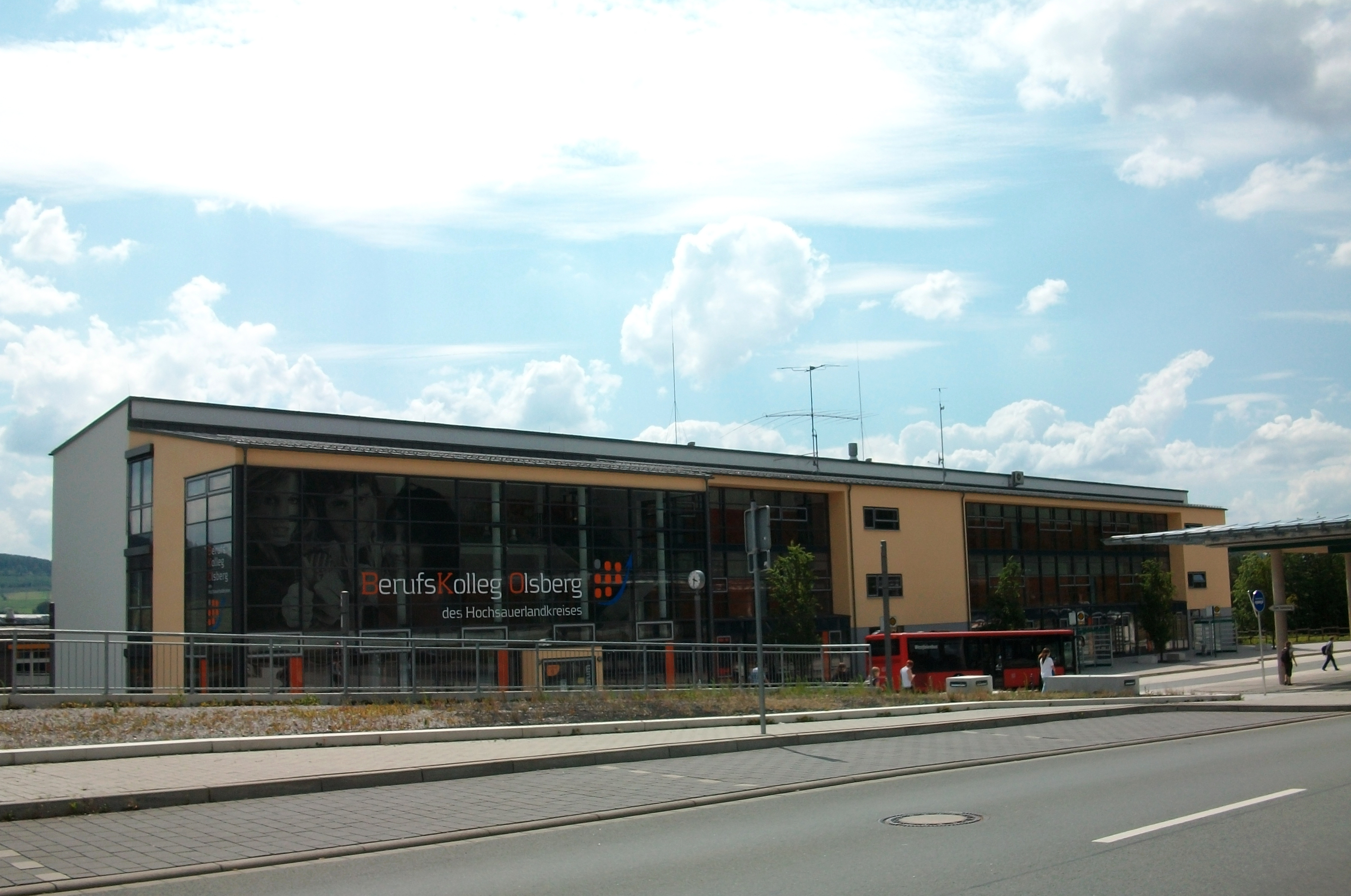 Berufskolleg Olsberg (Germany)